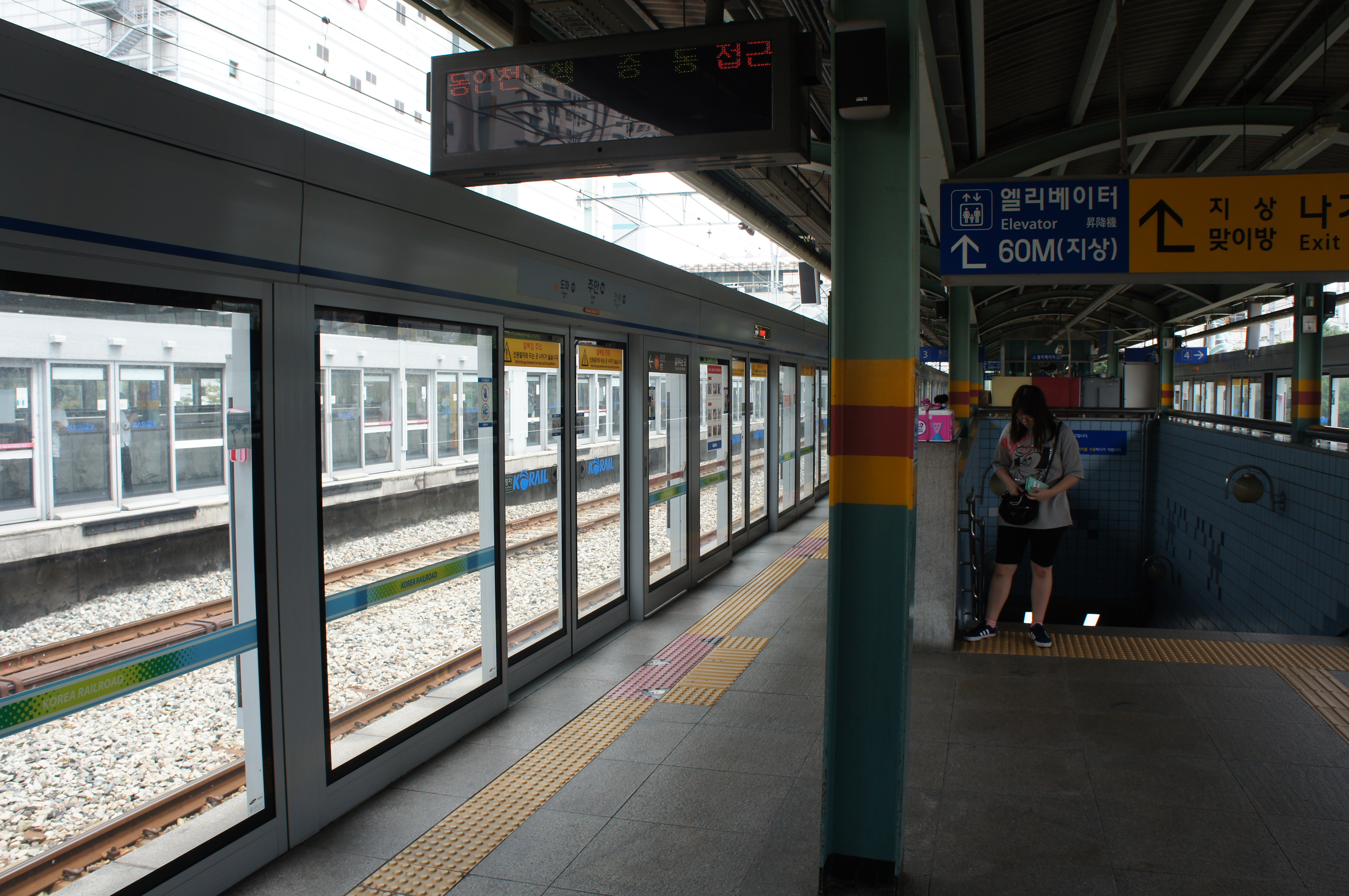 경인선 주안역 승강장